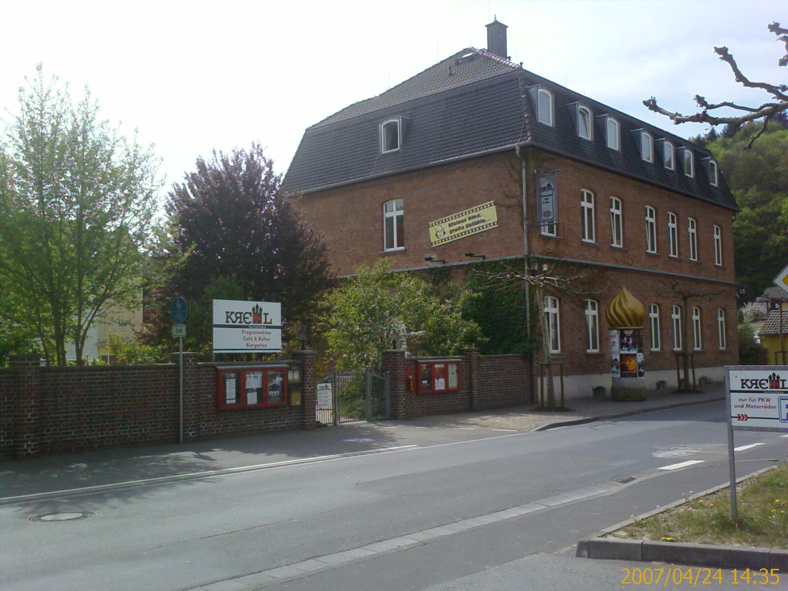 Kulturzentrum KREML Burgschwalbach